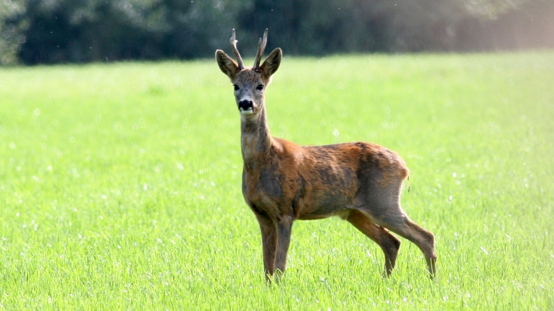 Roe Deer (Capreolus capreolus)